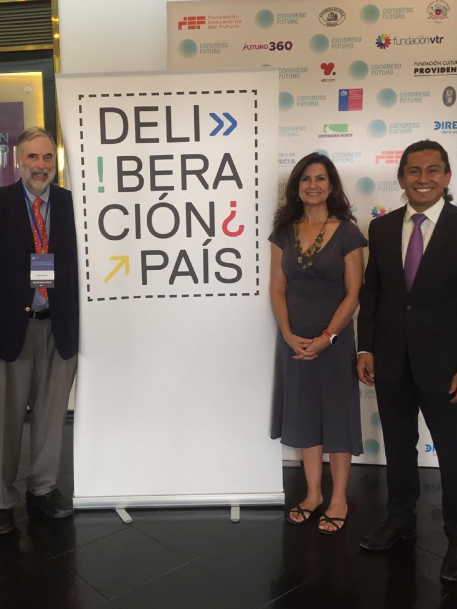 James S. Fishkin junto al equipo de la Fundación Tribu en el lanzamiento de Deliberación País. Santiago de Chile, 16 de enero de 2020.